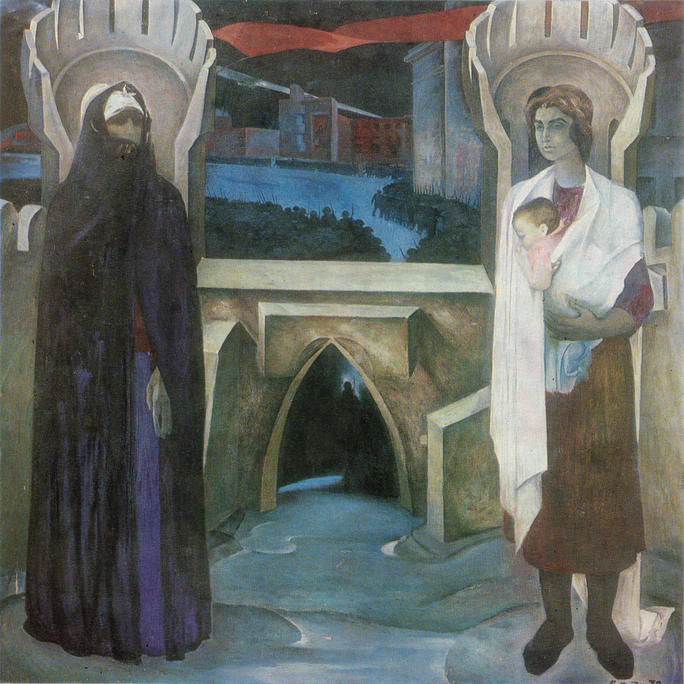 Картина «Бакинцы. Сорок первый год». Художник Нариманбеков Видади Якуб оглы. Холст, масло, 180х180 Азербайджанский государственный музей искусств